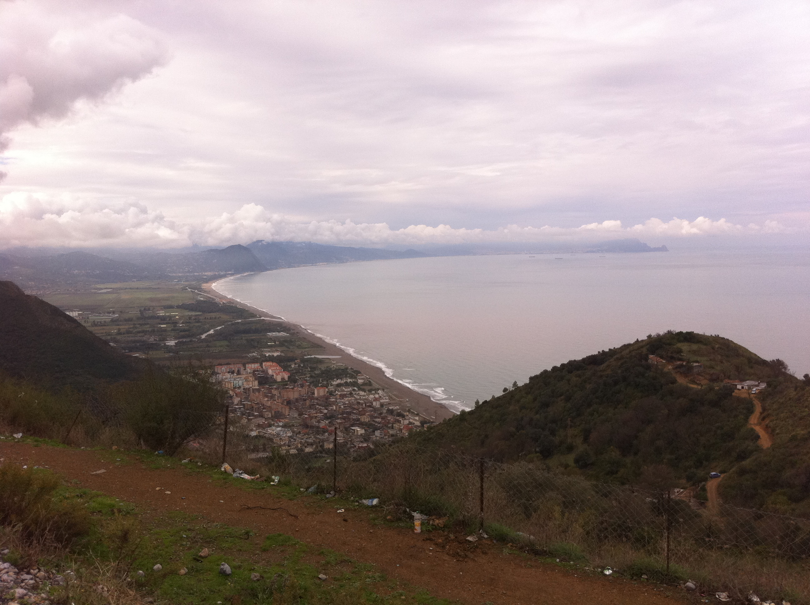 la ville et la plage de MELBOU